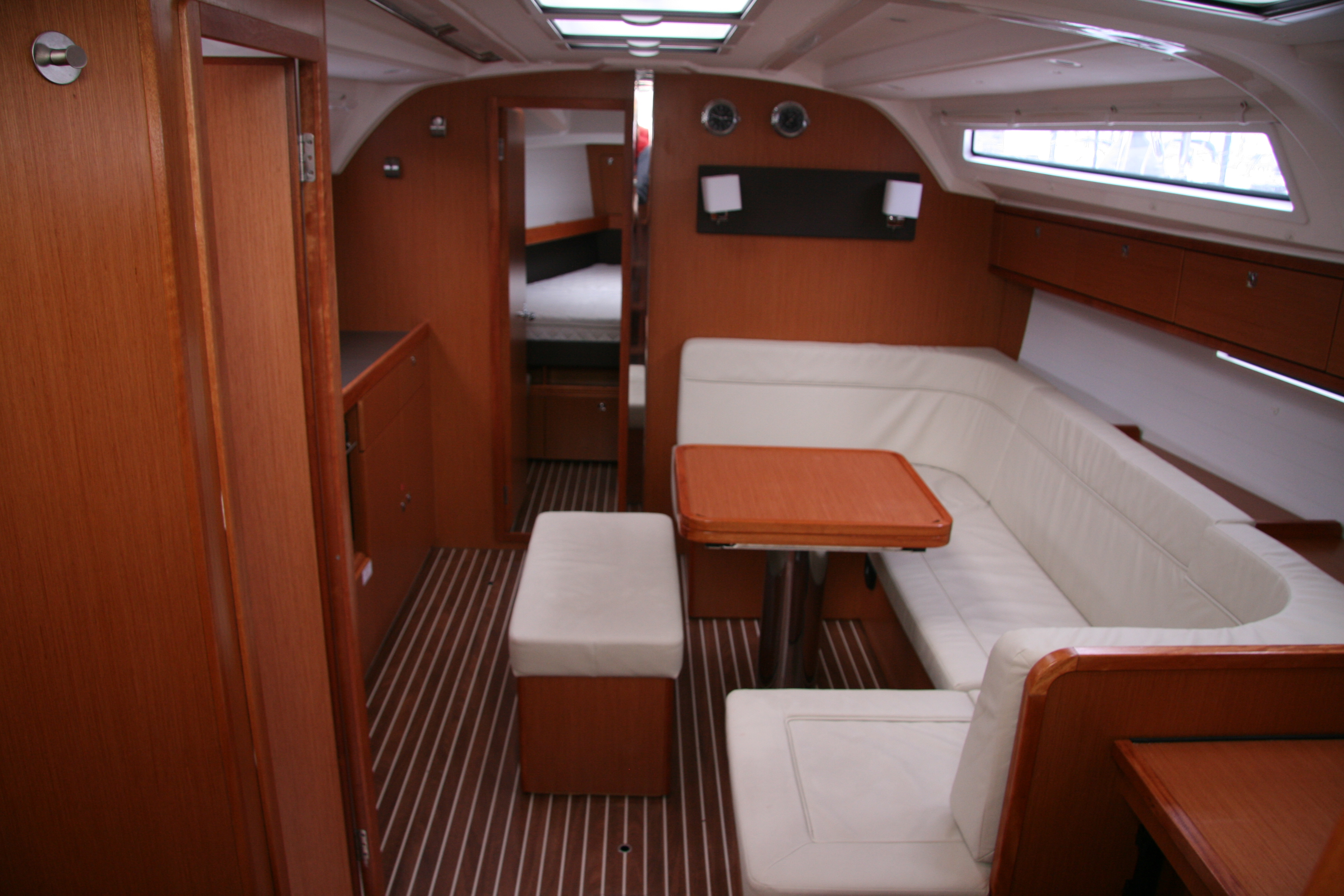 Salon der Bavaria cruiser 41 mit Blick auf das Vorschiff